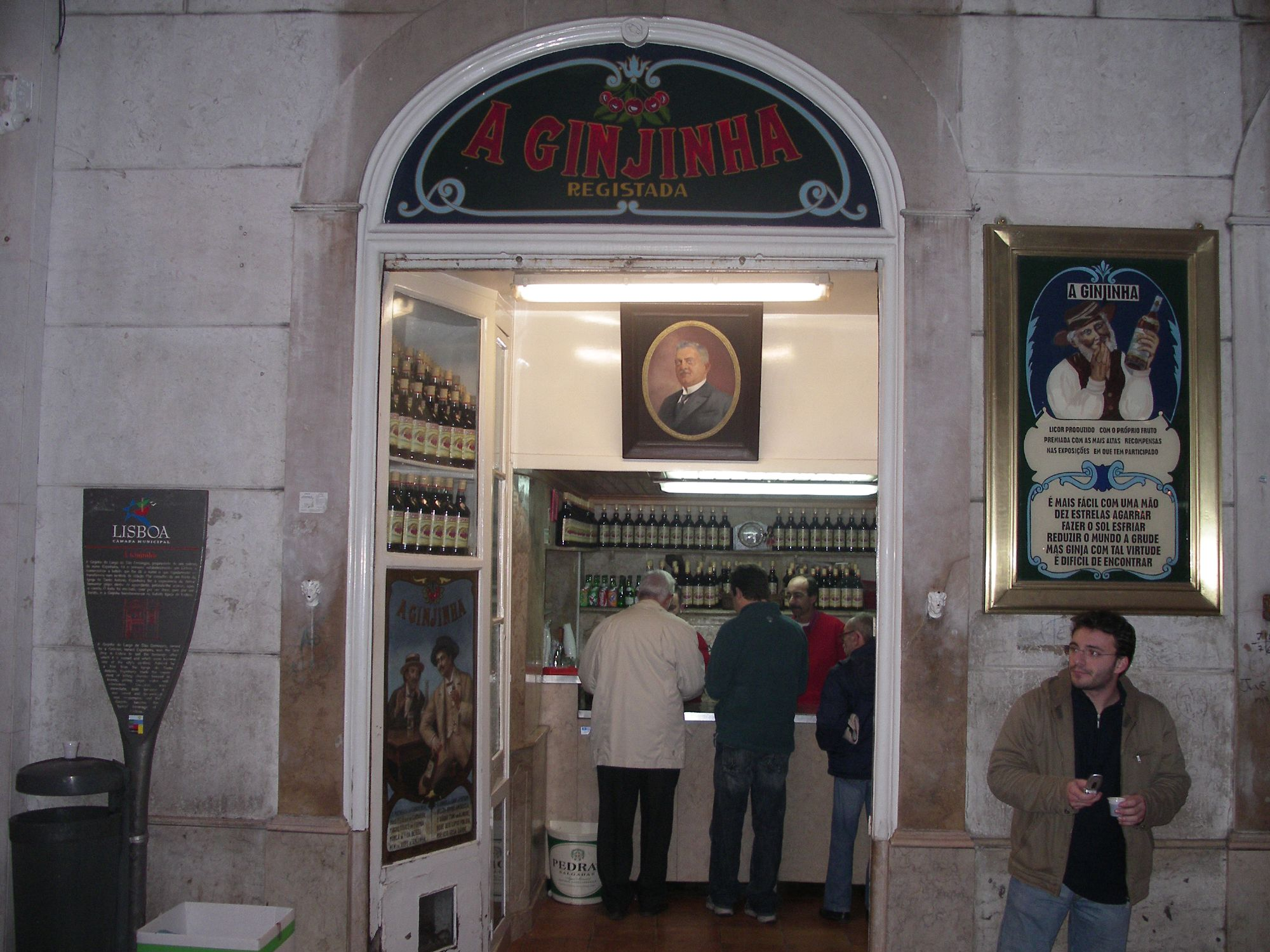 Ginjinha store, Lisbon, Portugal